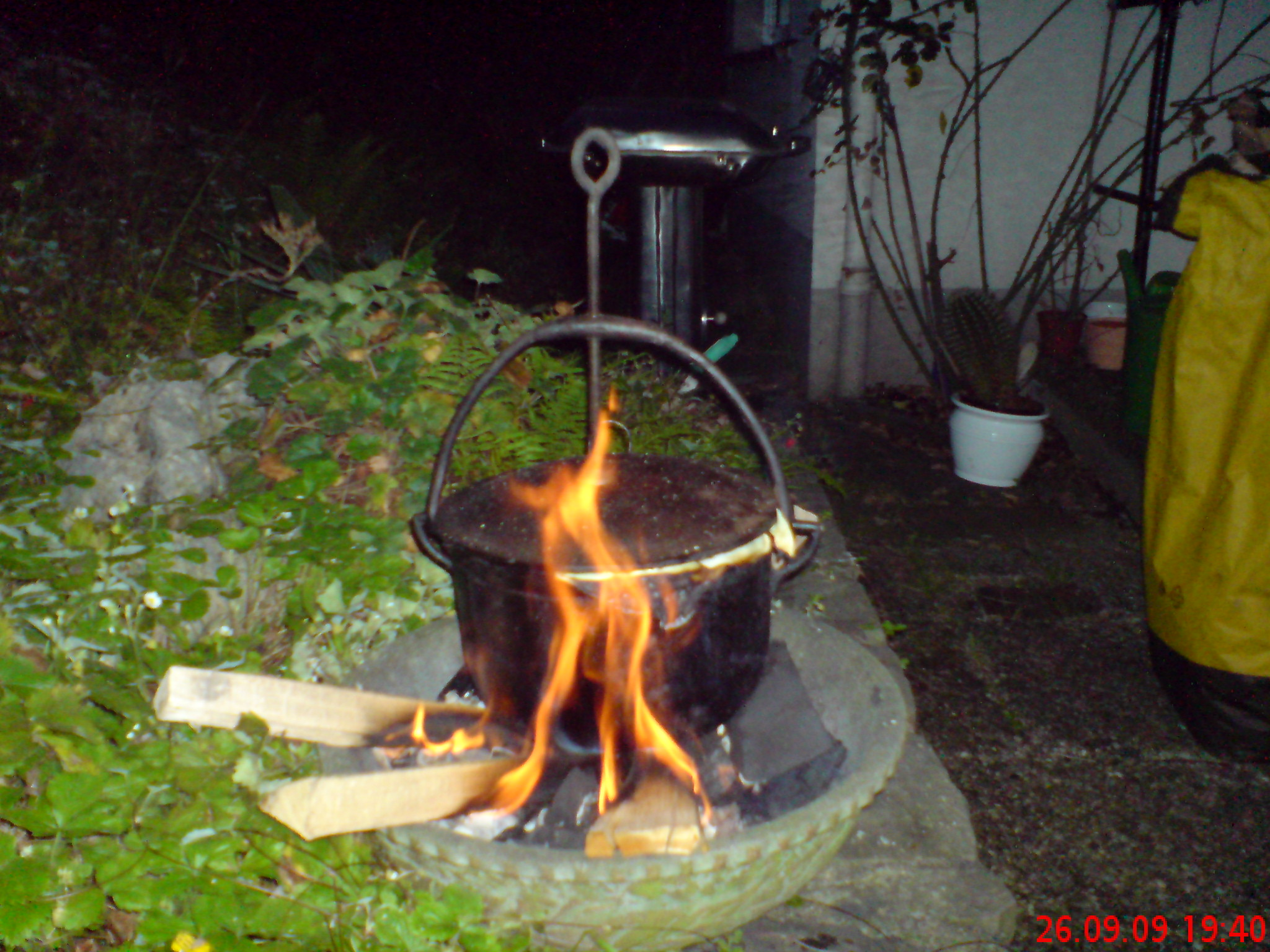 Kociołek